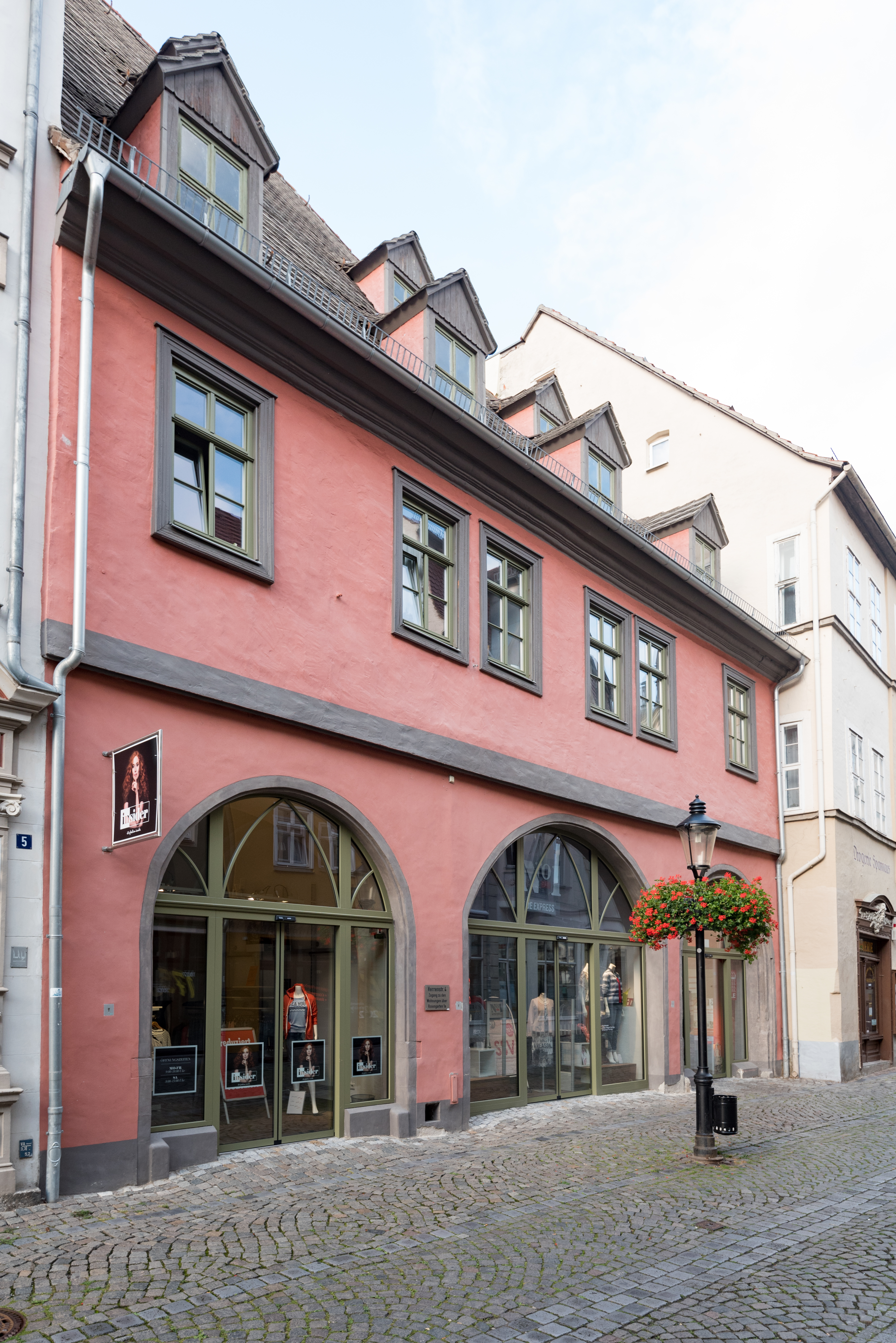 Naumburg (Saale), Herrenstraße 4